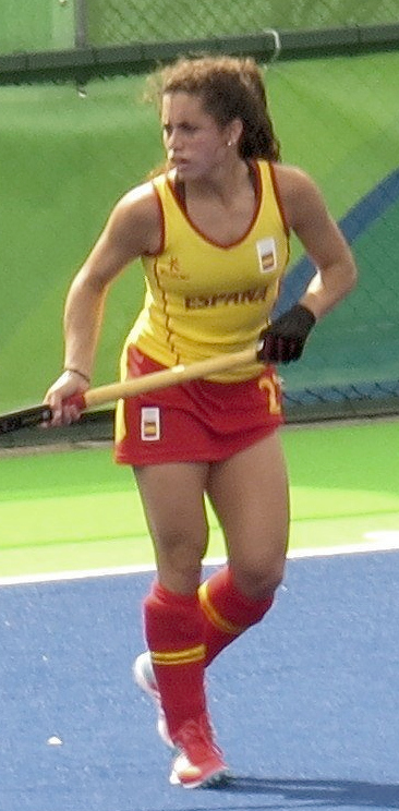 Rio 2016.Hóquei na grama. Feminino. Holanda x Espanha. sx 88